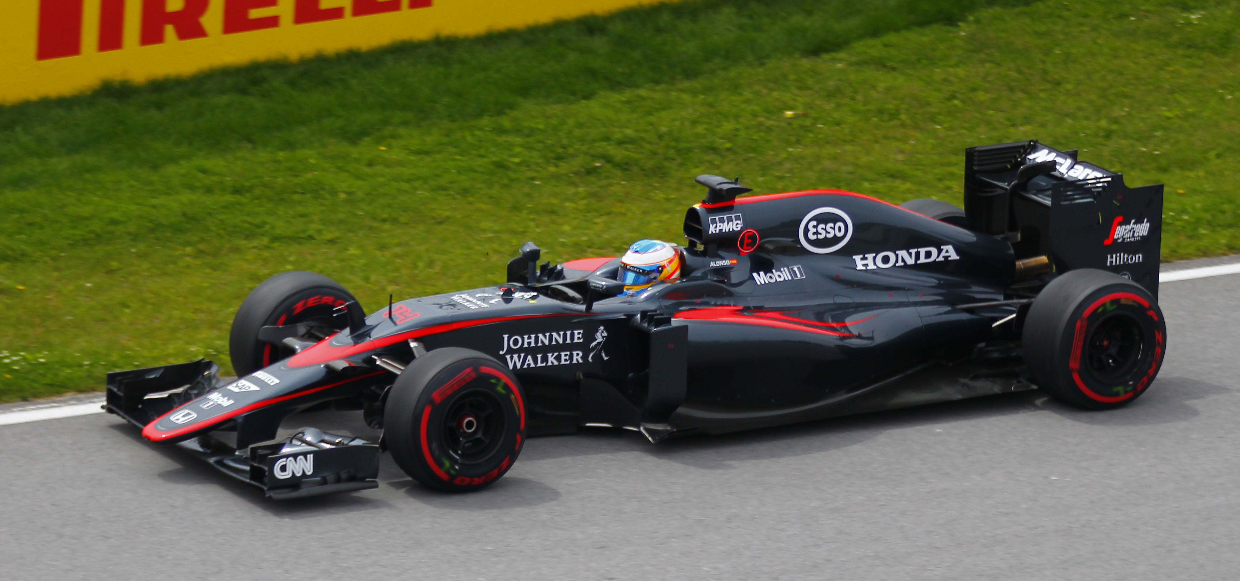 Fernando Alonso - McLaren Racing - Grand Prix du Canada - Circuit Gilles-Villeneuve - 7 juin 2015 (Photo Paul-Émile Poulin-Jacques)